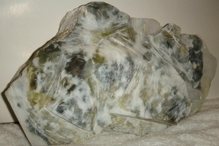 一块尚未加工的蓝田玉。维基人Refrain在2005年拍摄。